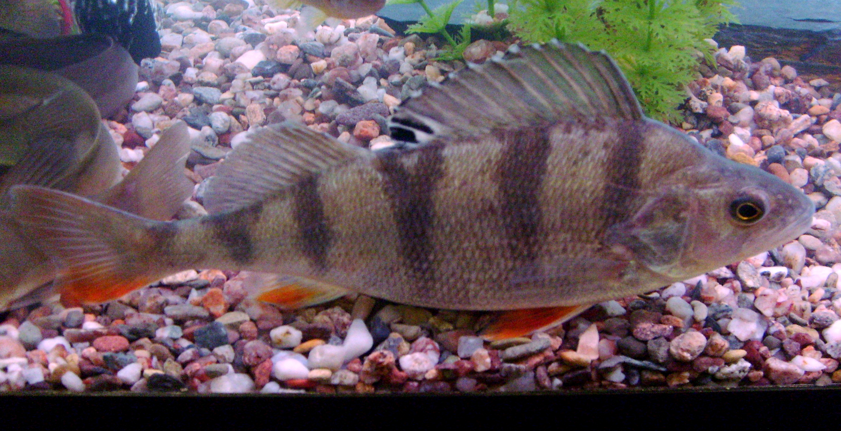 Okoun říční (Perca fluviatilis) v akváriu na veletrhu Petrův zdar.